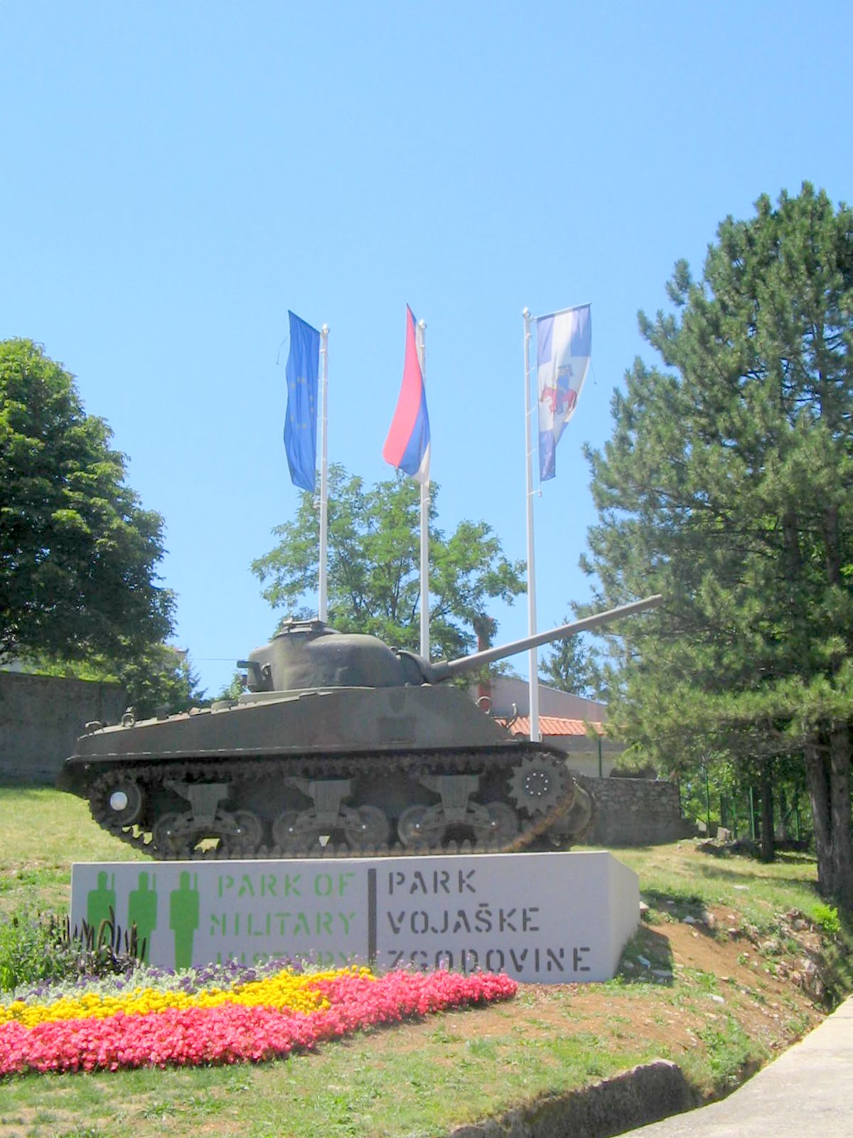 Park of Military History, Pivka, Slovenija